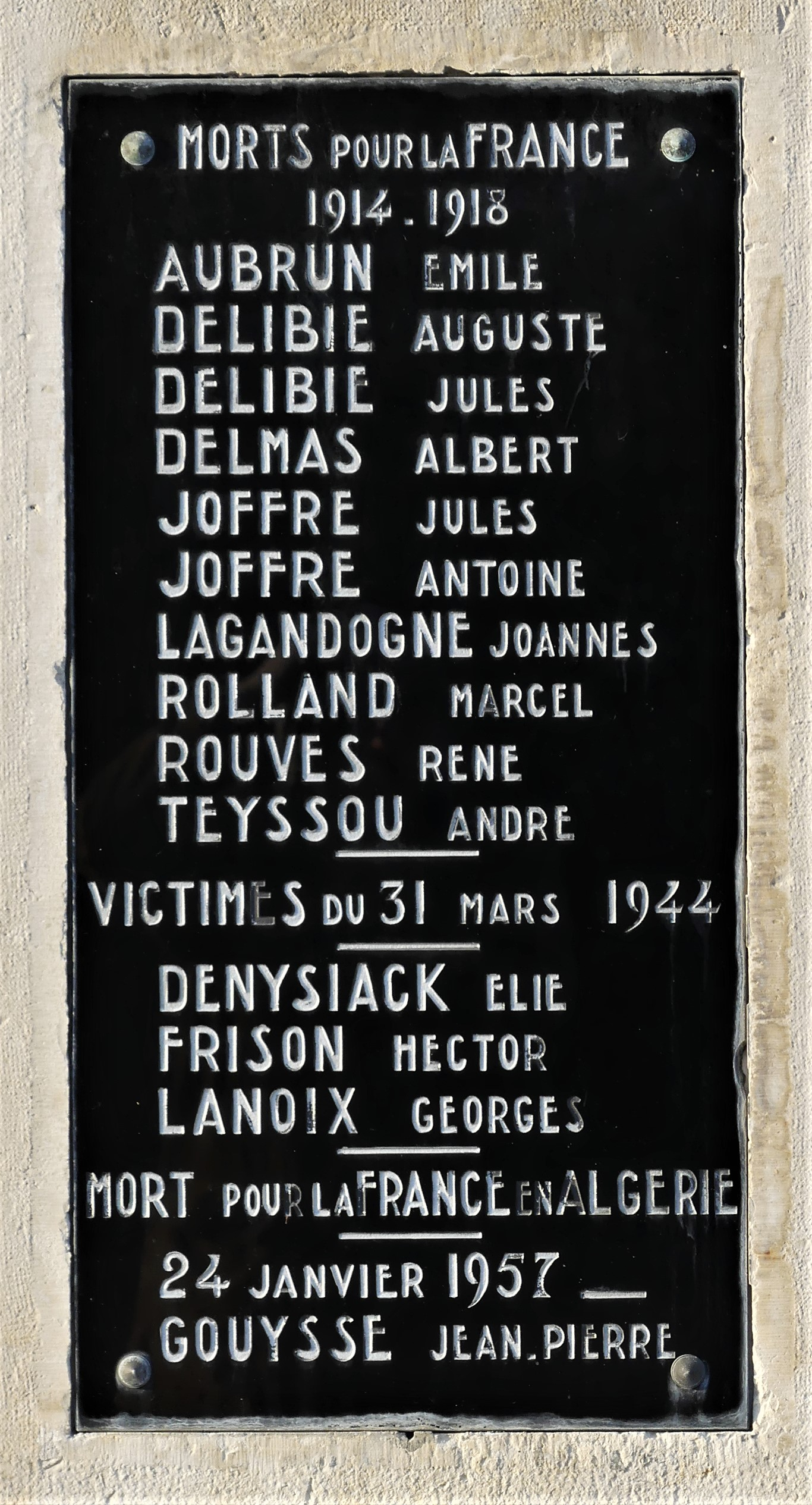 La plaque du monument aux morts de Coly, Dordogne, France.